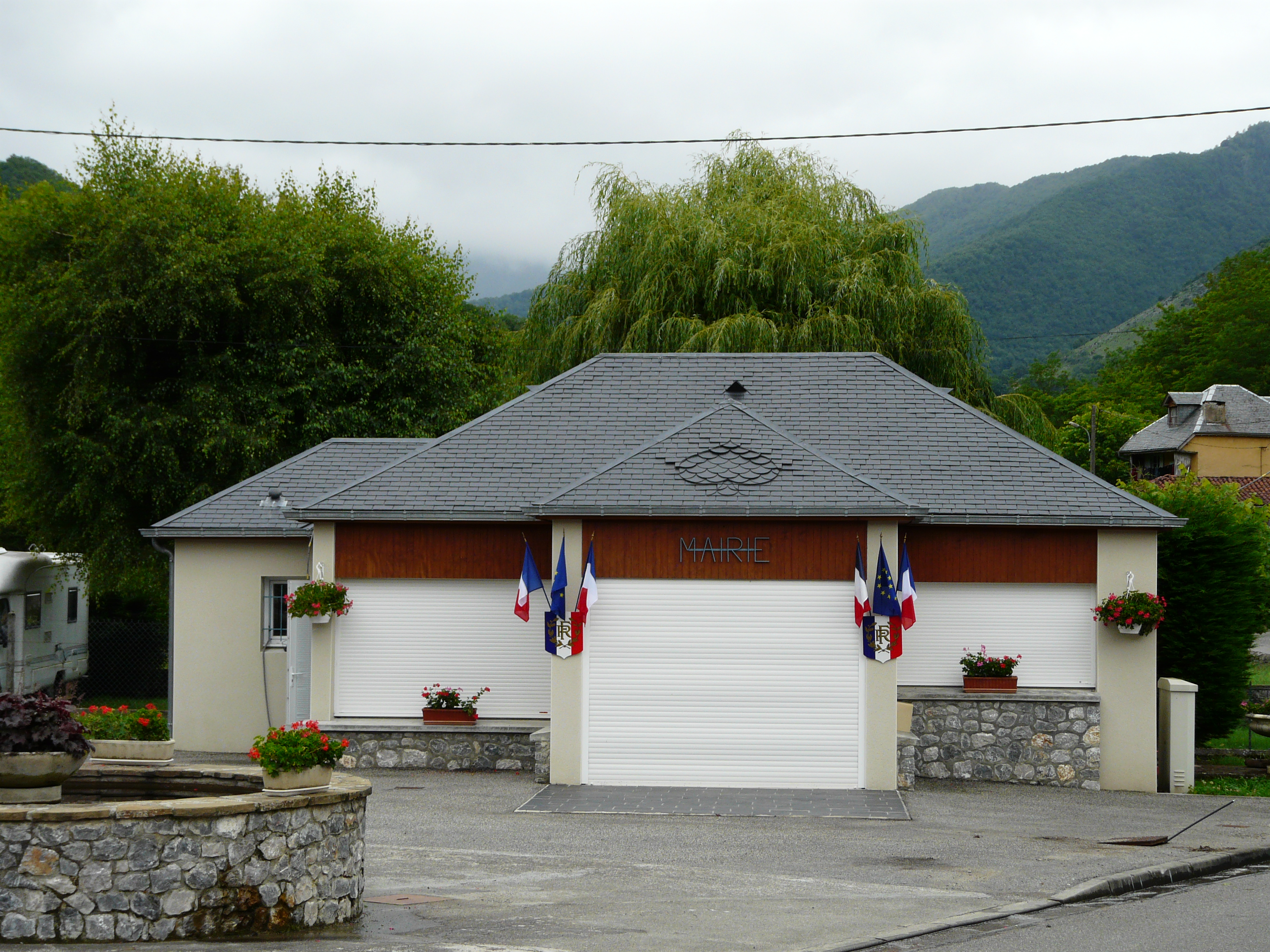 La mairie de Cazarilh, Hautes-Pyrénées, France.